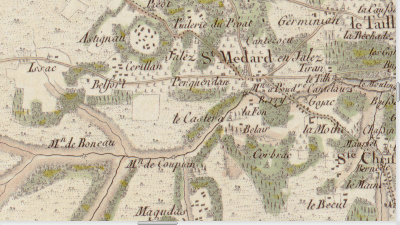 Carte de Cassini n°104 (Gironde, zoom sur Saint-Médard-en-Jalles), 1756.